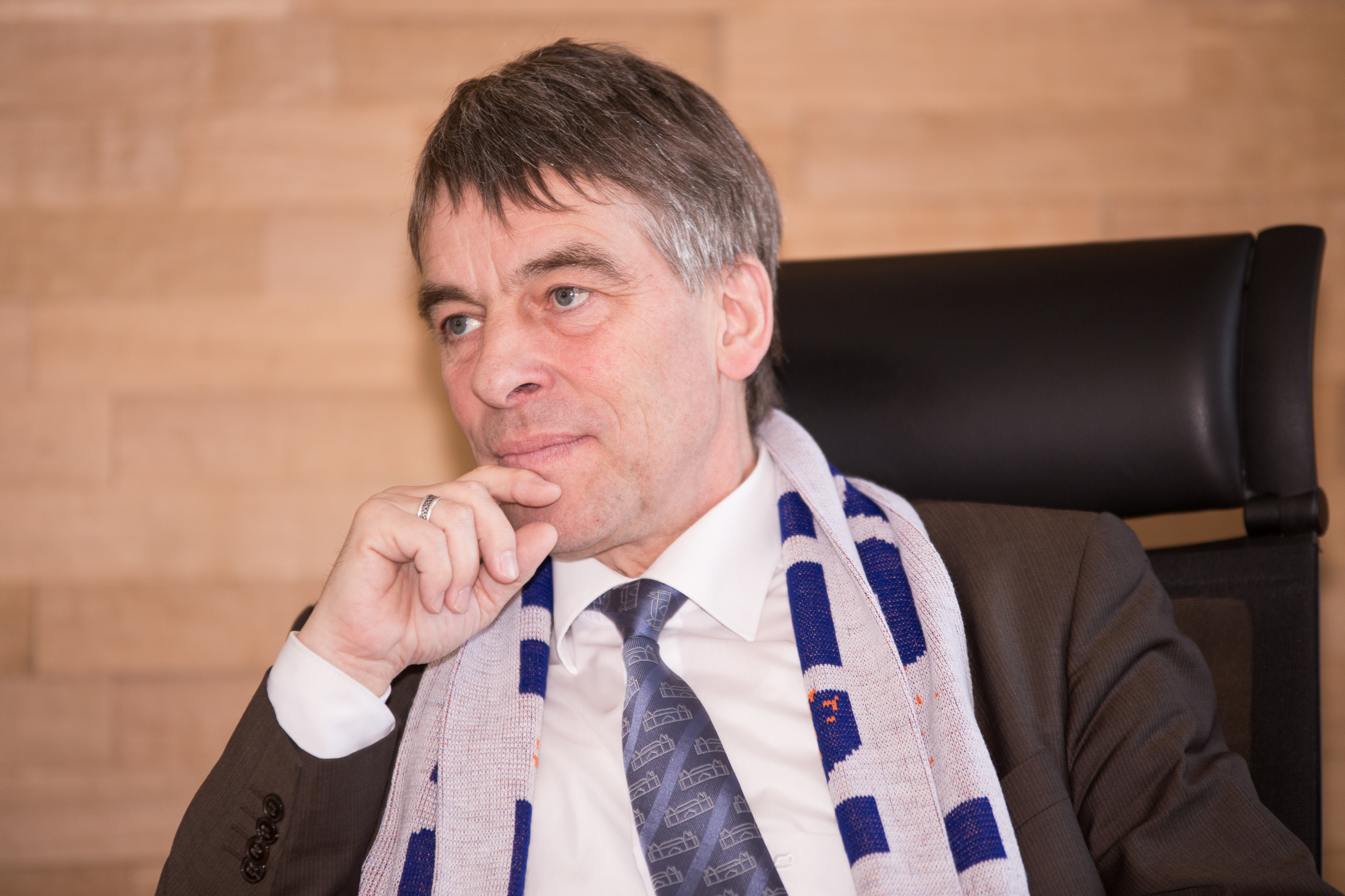 Fußball, Frauen, Allianz Frauen-Bundesliga, FF USV Jena, Pressegespräch mit dem Oberbürgermeister; Jenas Oberbürgermeister Albrecht Schröter mit FF USV Jena-Schal; Porträt